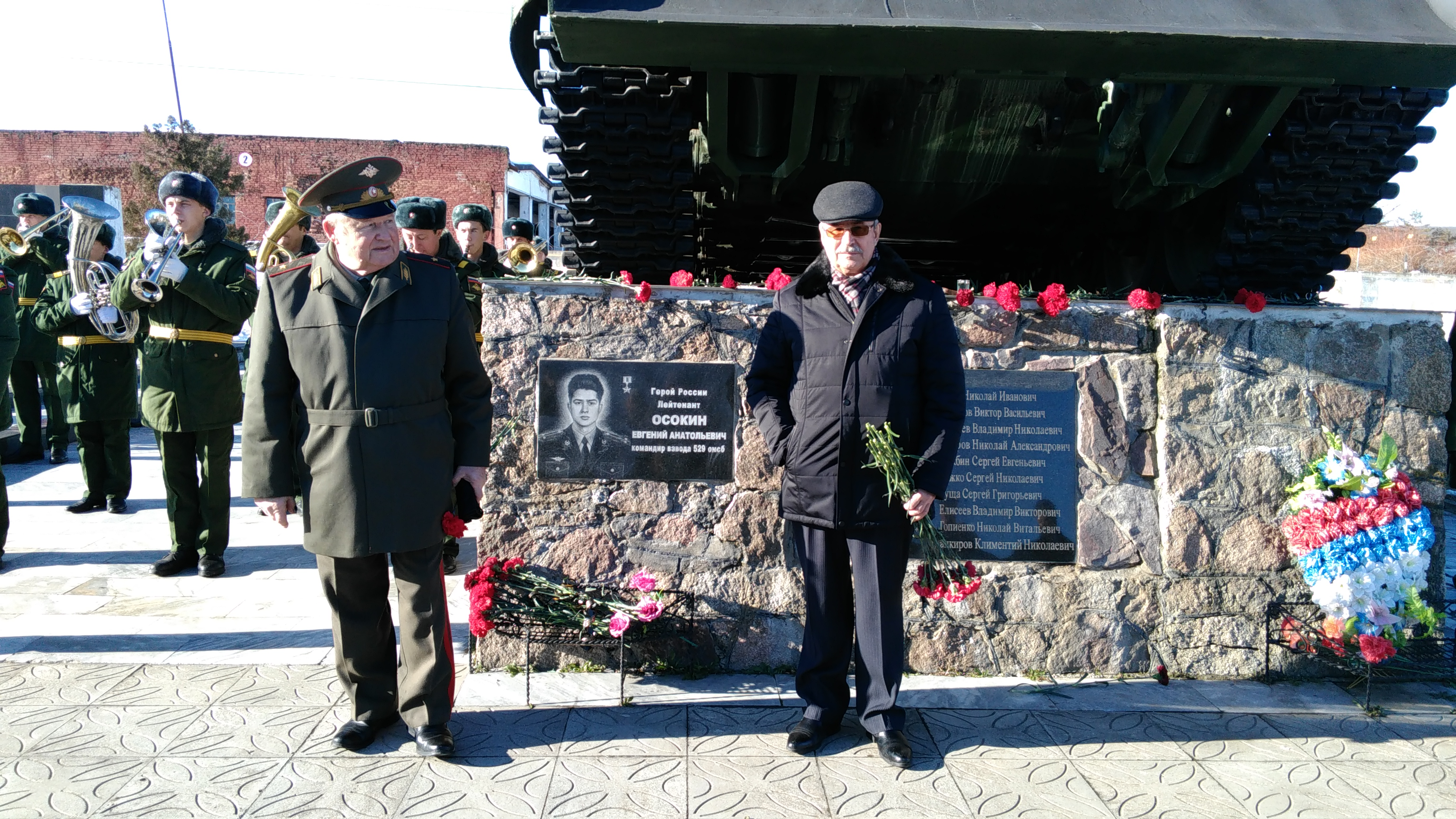 На мемориале в Майкопе 2.1.2017 генерал Дорофеев А. А. и полковник Осокин А. Я.